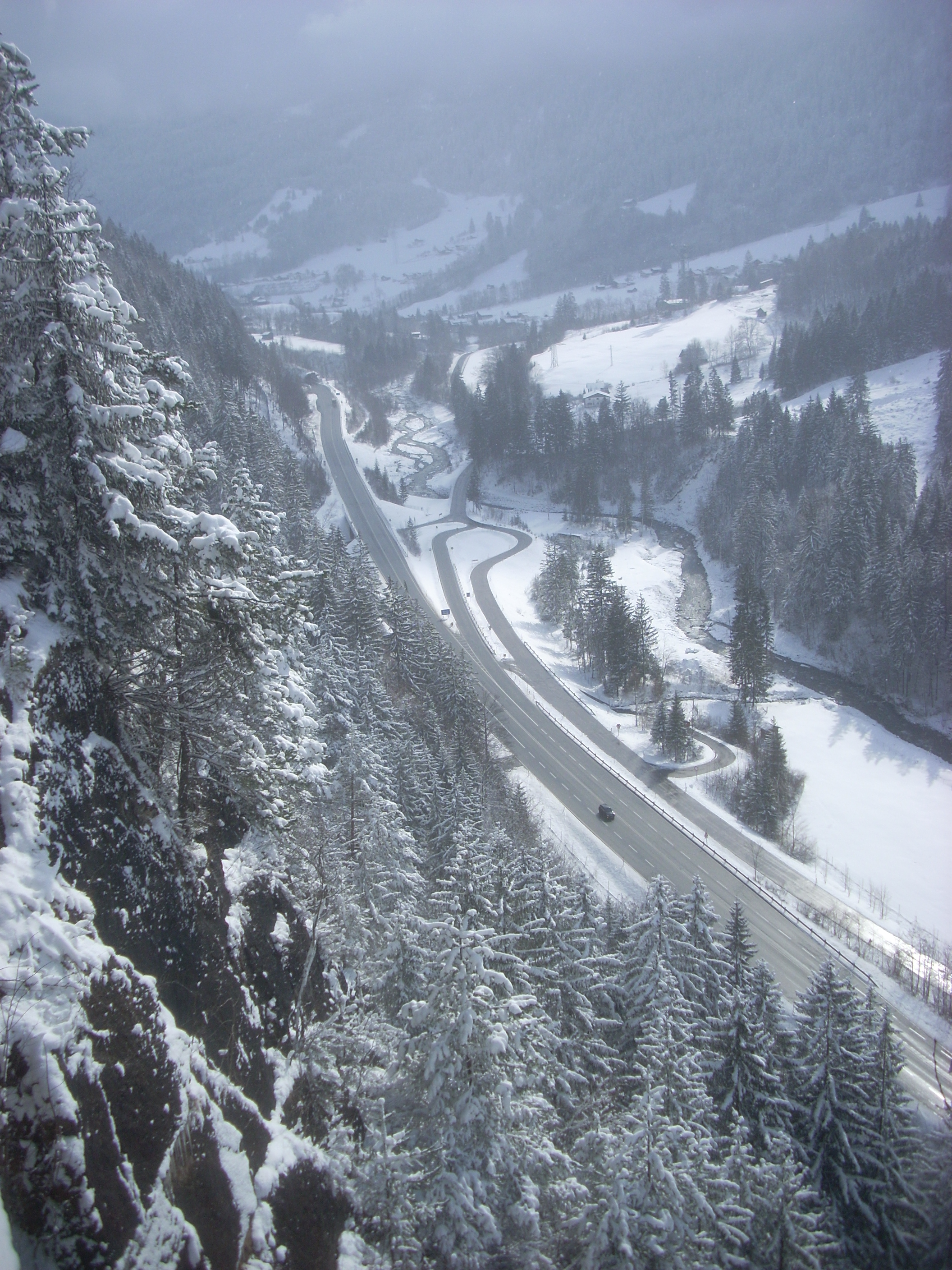 Die S16 Ausfahrt Dalaas